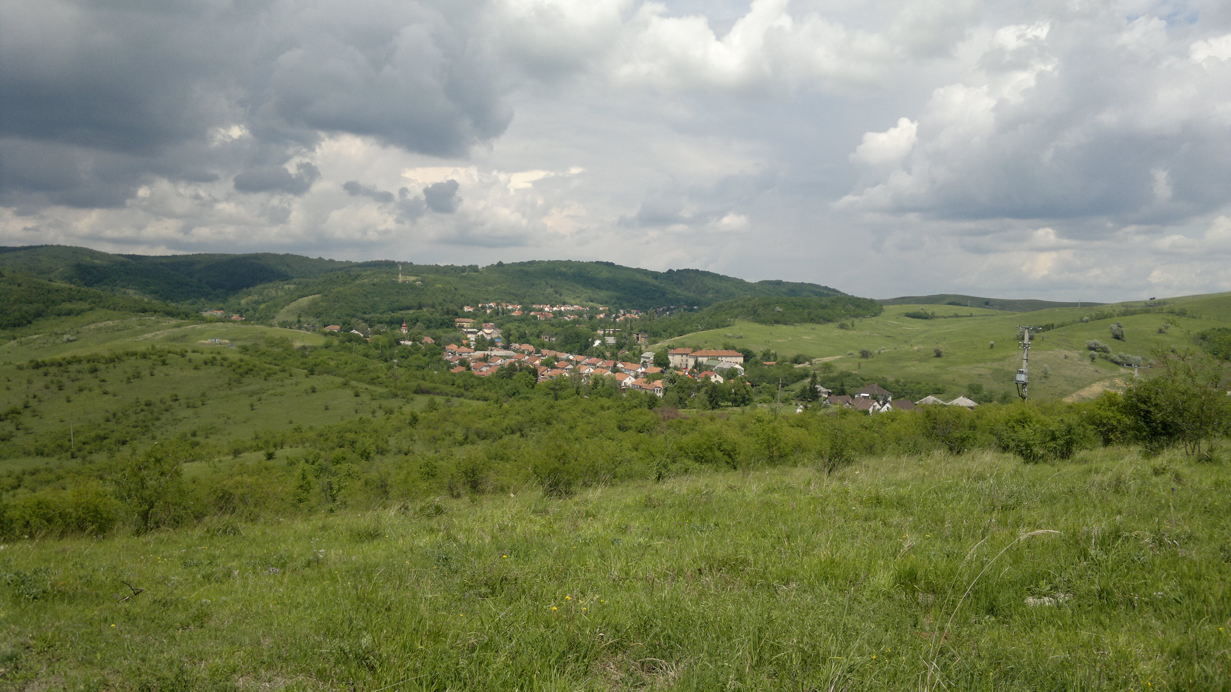 Egercsehi Bányatelep